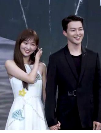 Jin Ki-joo y Jang Ki-yong en la conferencia de prensa de Come and Hug Me